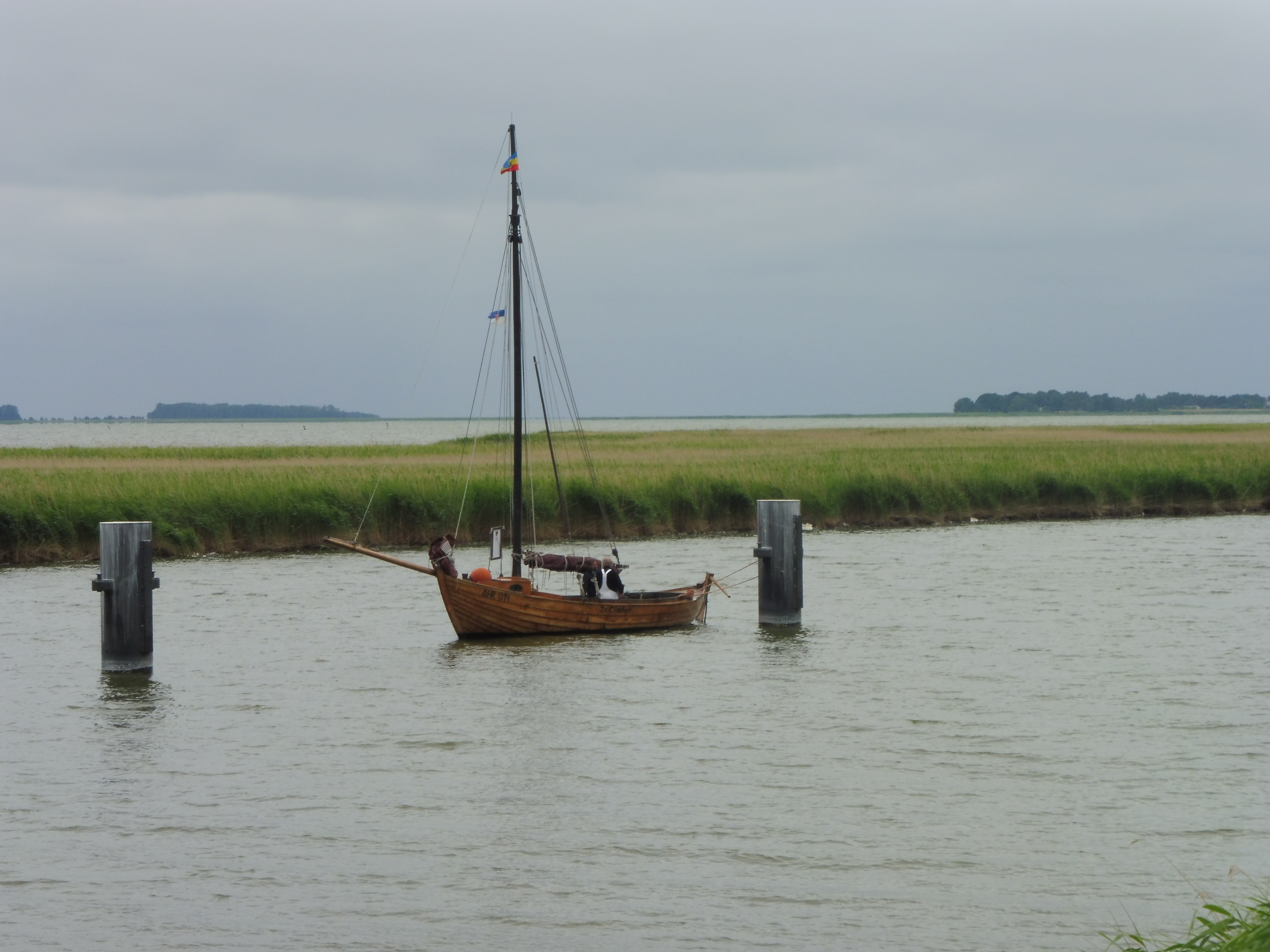 Westlicher Ausgang des Meiningenstroms an der Meiningenbrücke